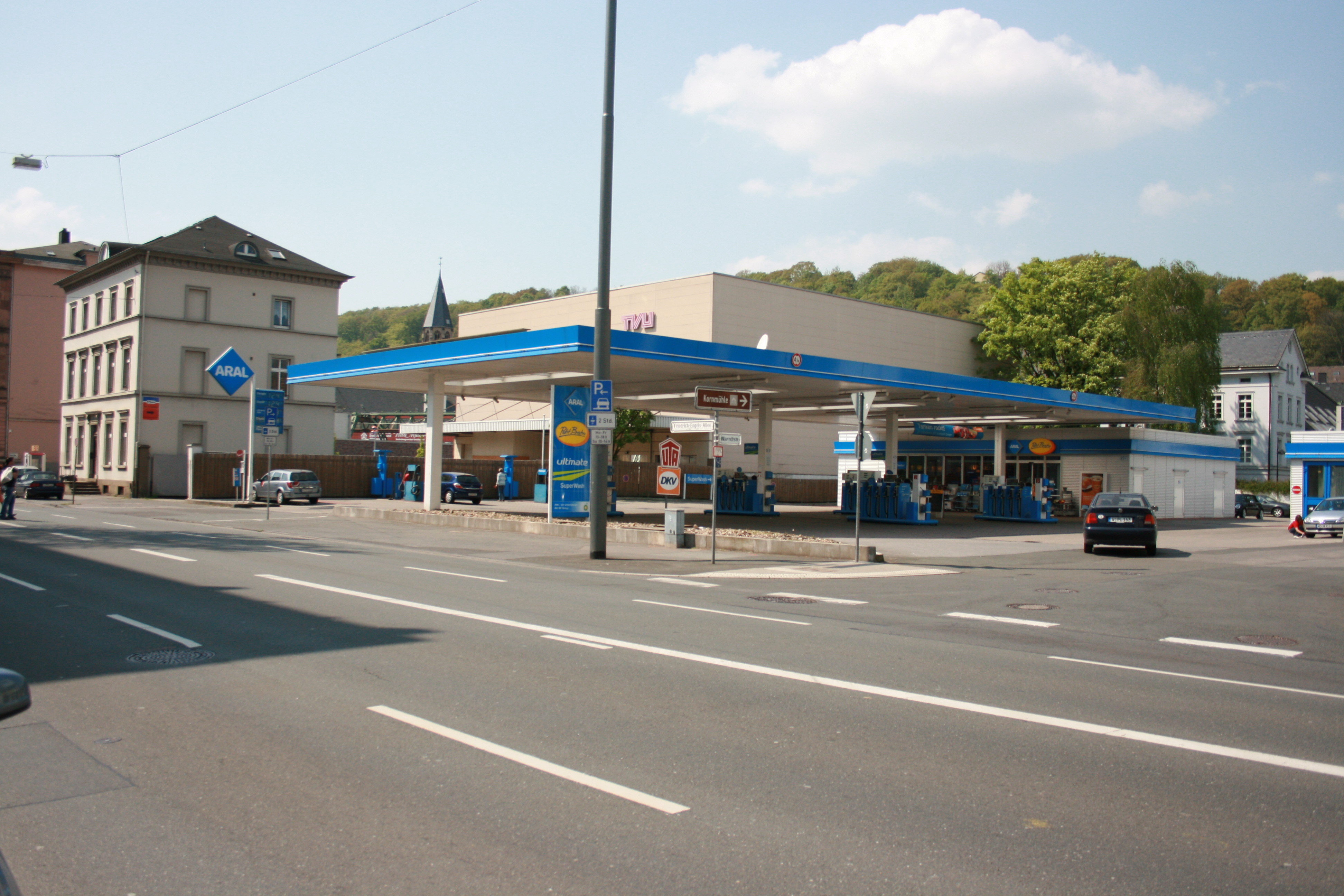 Friedrich-Engels-Allee 237 in Wuppertal